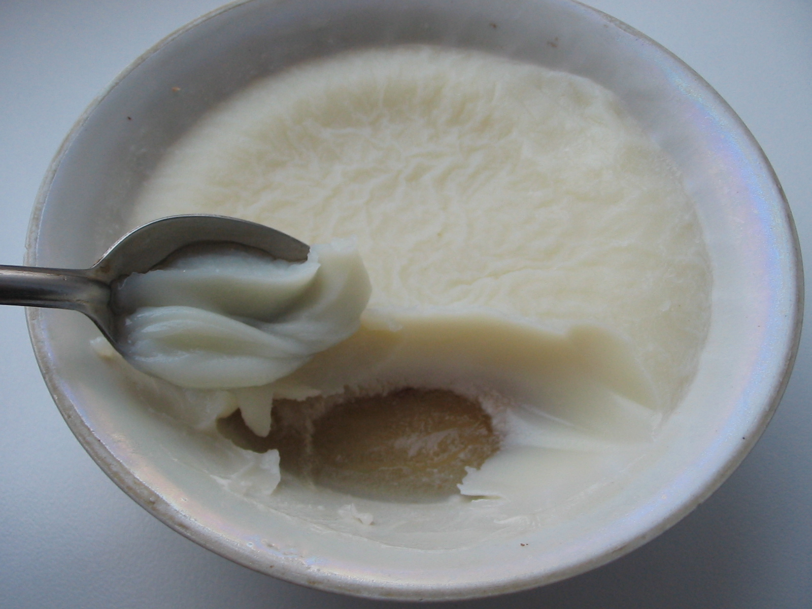 Холодець: лишній жир, видалений при варінні холодцю